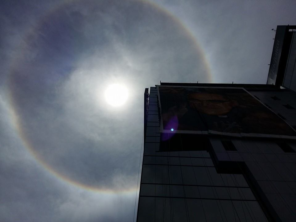 Halo Solar Formado después de la Beatificacion de Monseñor Romero